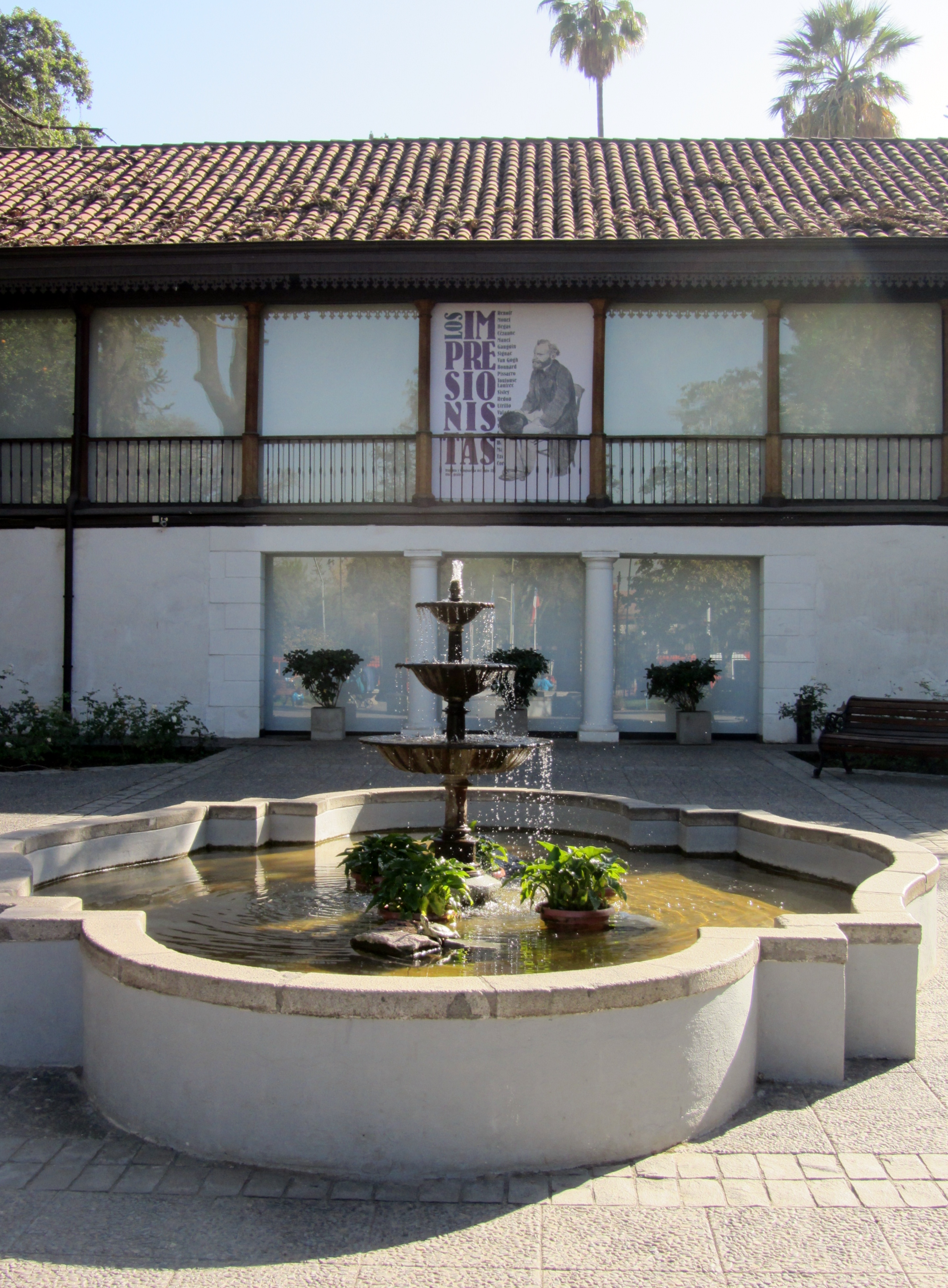 Centro Cultural Las Condes, Santiago de Chile, antigua chacra El Rosario This is a photo of a national monument in Chile: 1635